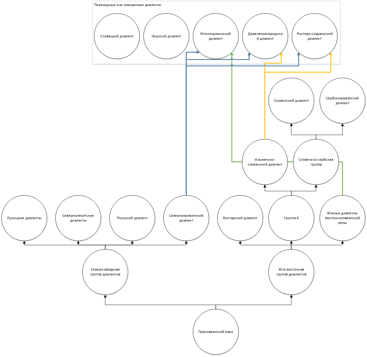 Диалекты славянских языков по работе А. А. Зализняка